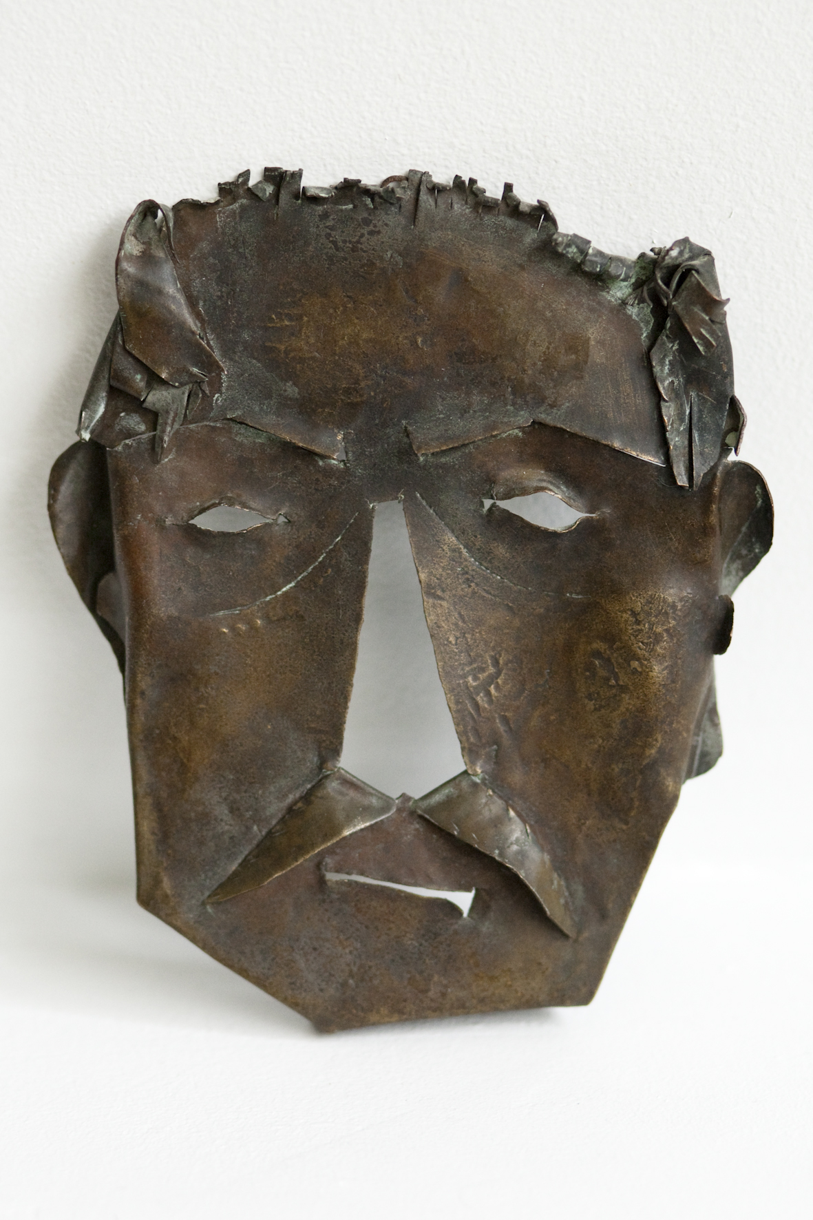 15 x 12,5 x 1,5 cm - Cuivre